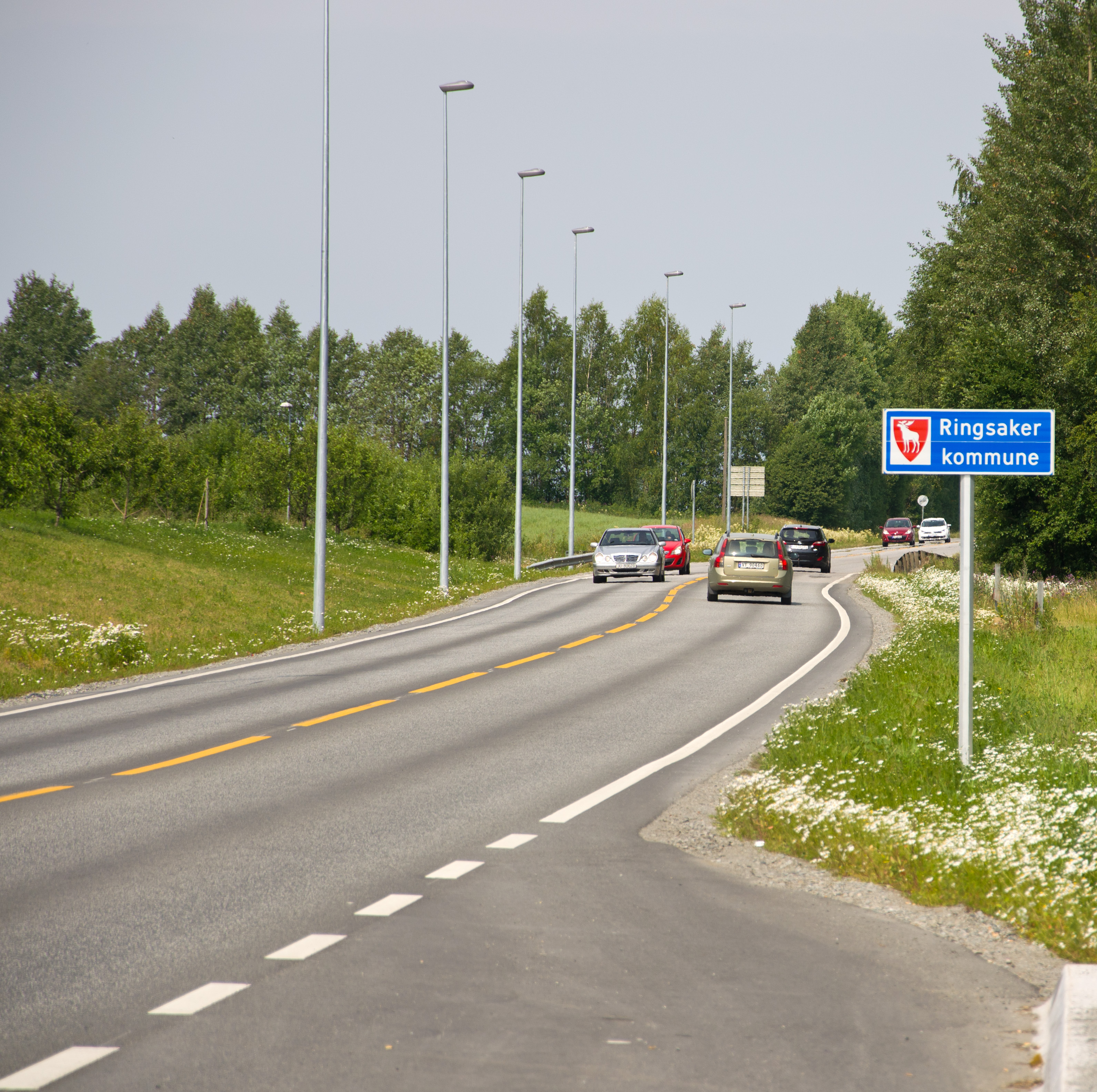 Fylkesvei 184, ved Olrud